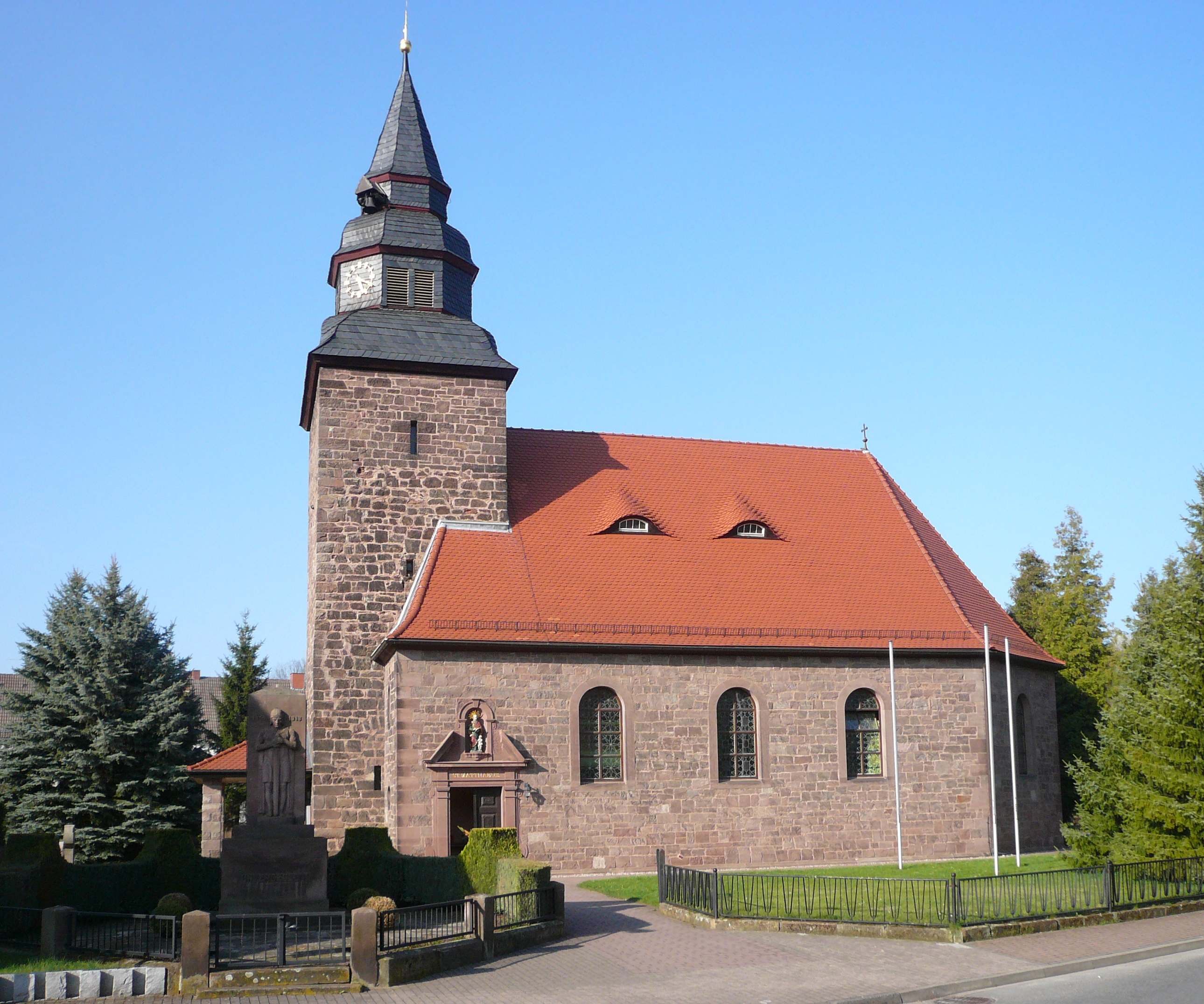 Katholische Kirche St. Matthäus in Arenshausen, Landkreis Eichsfeld, Thüringen. Erbaut 1919-20, Turm aus der Mitte des 18. Jahrhunderts